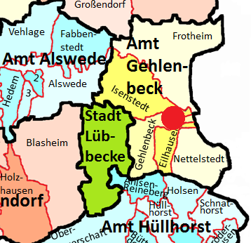 Lage des Amtfreibades Gehlenbeck